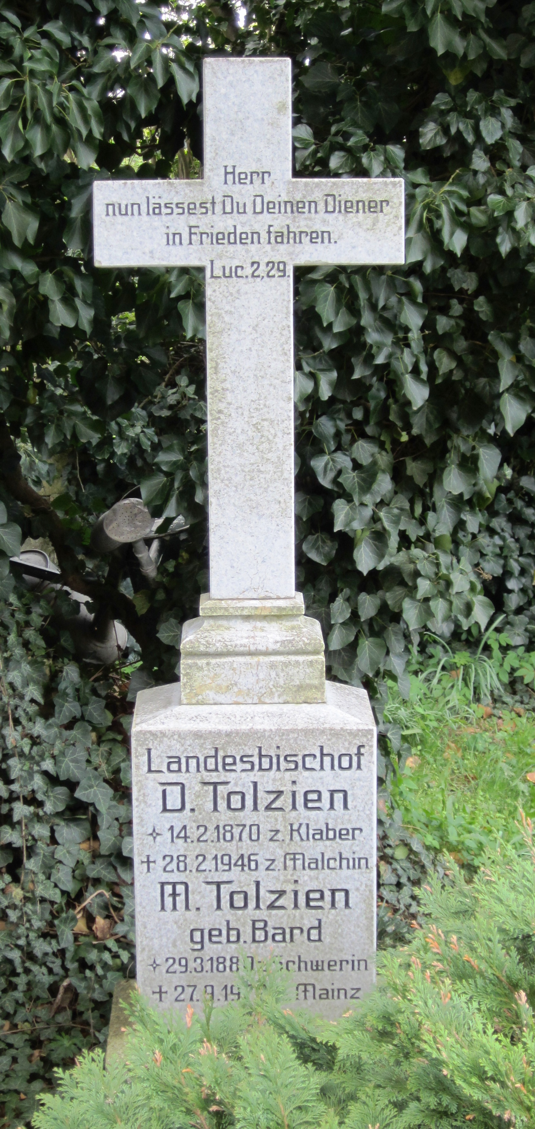 Grab Gerhard Tolzien (1870-1946) in Basedow